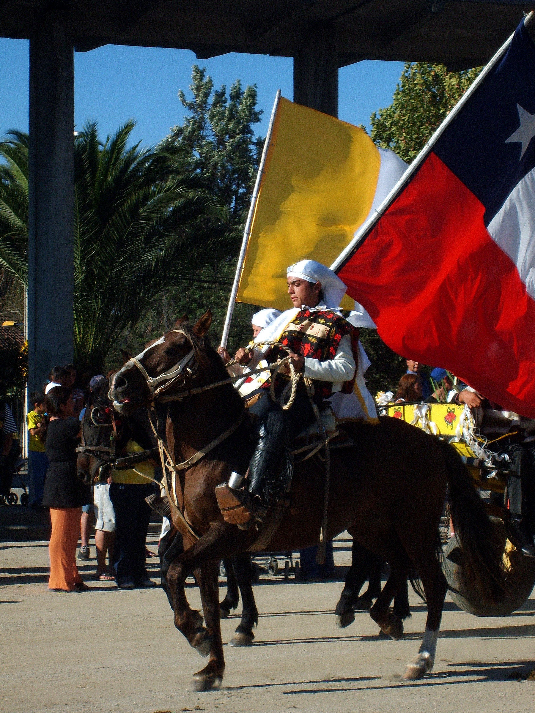 Jienete participante del Cuasimodo, llegando al Templo Votivo de Maipú en Santiago de Chile, 30 de marzo de 2008.